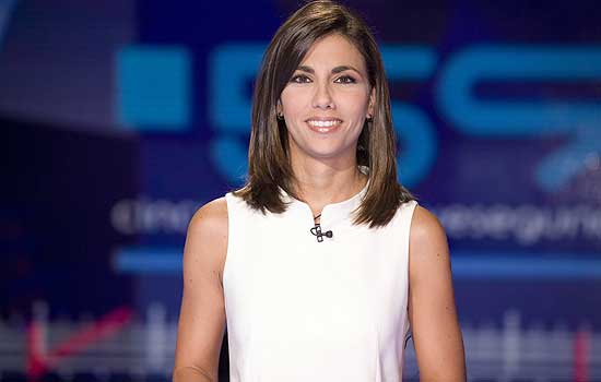 La periodista española Ana Pastor.